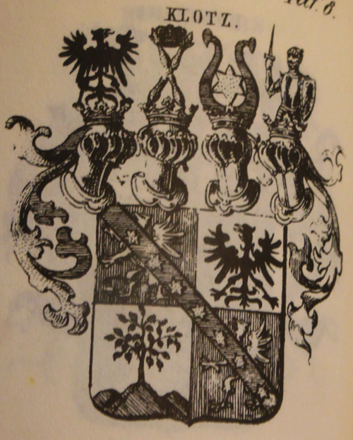 Wappen der Klotz